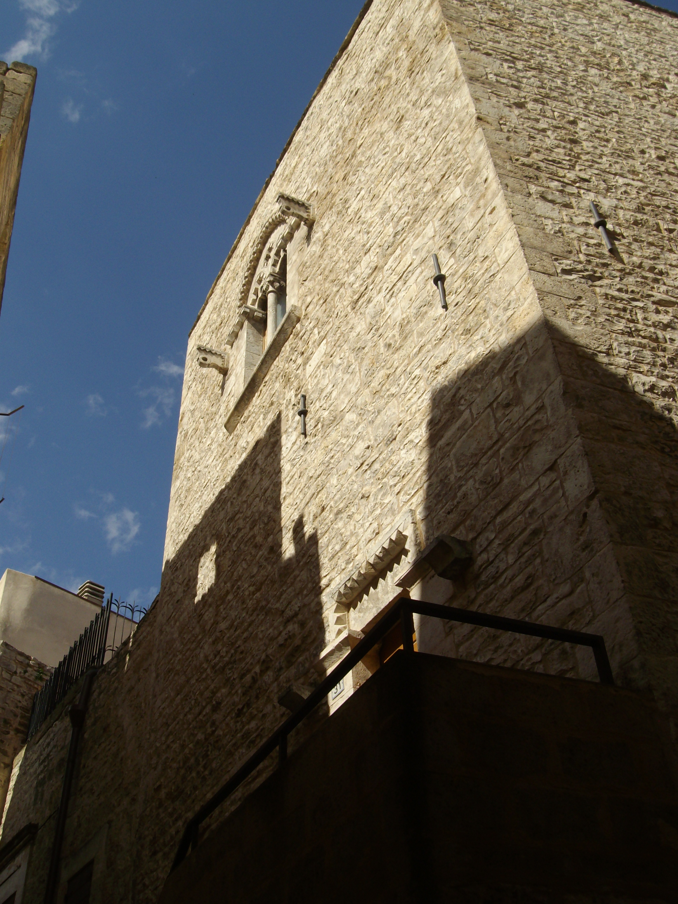 Casa dei Cavalieri di Malta a Bitetto